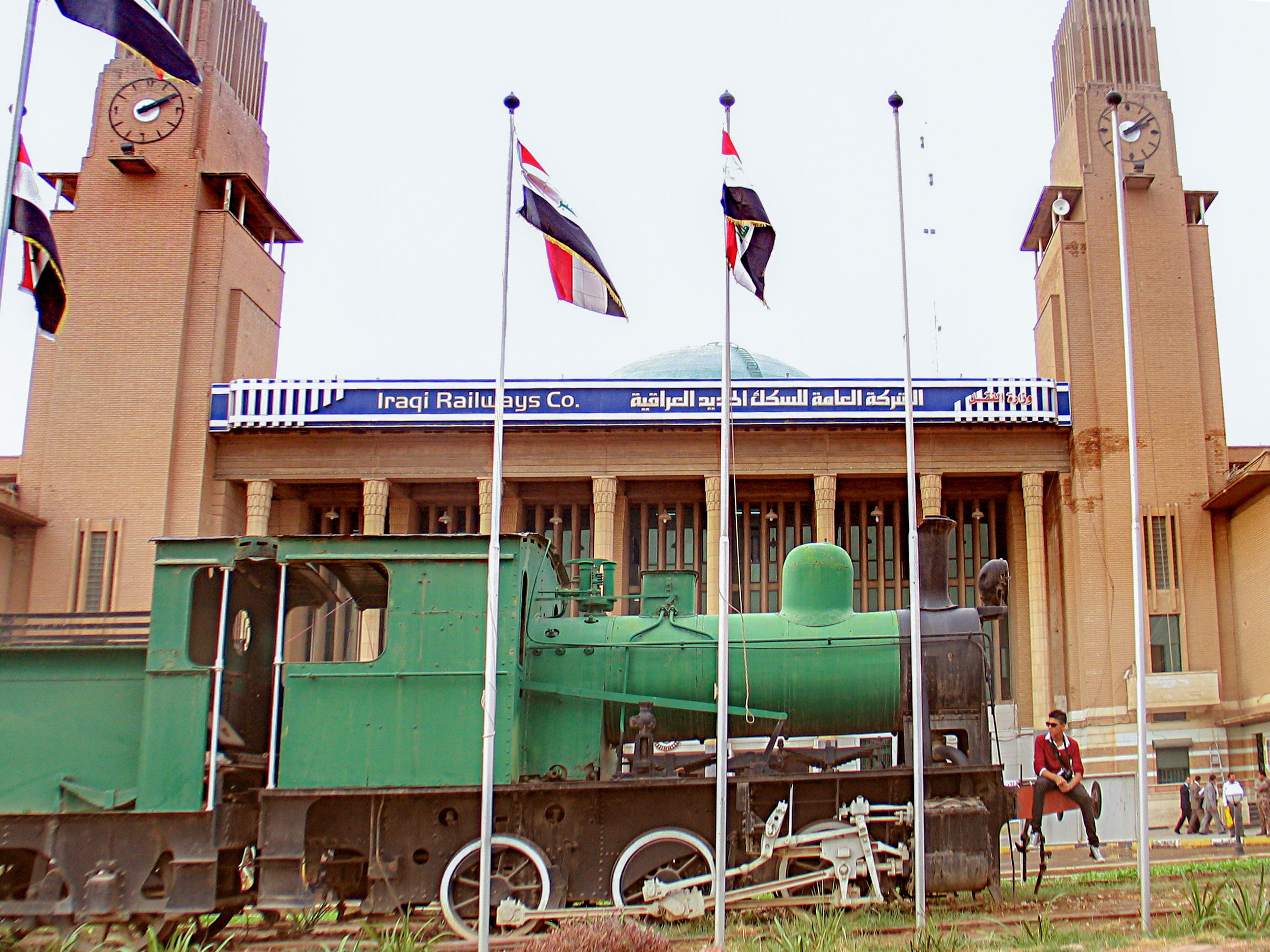 صورة خارجية لمحطة القطار العالمية في جانب الكرخ من بغداد